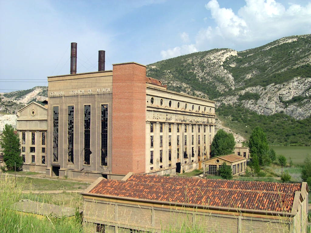 Aragonés: Antigua central termica d'Aliaga (Tergüel, Aragón)